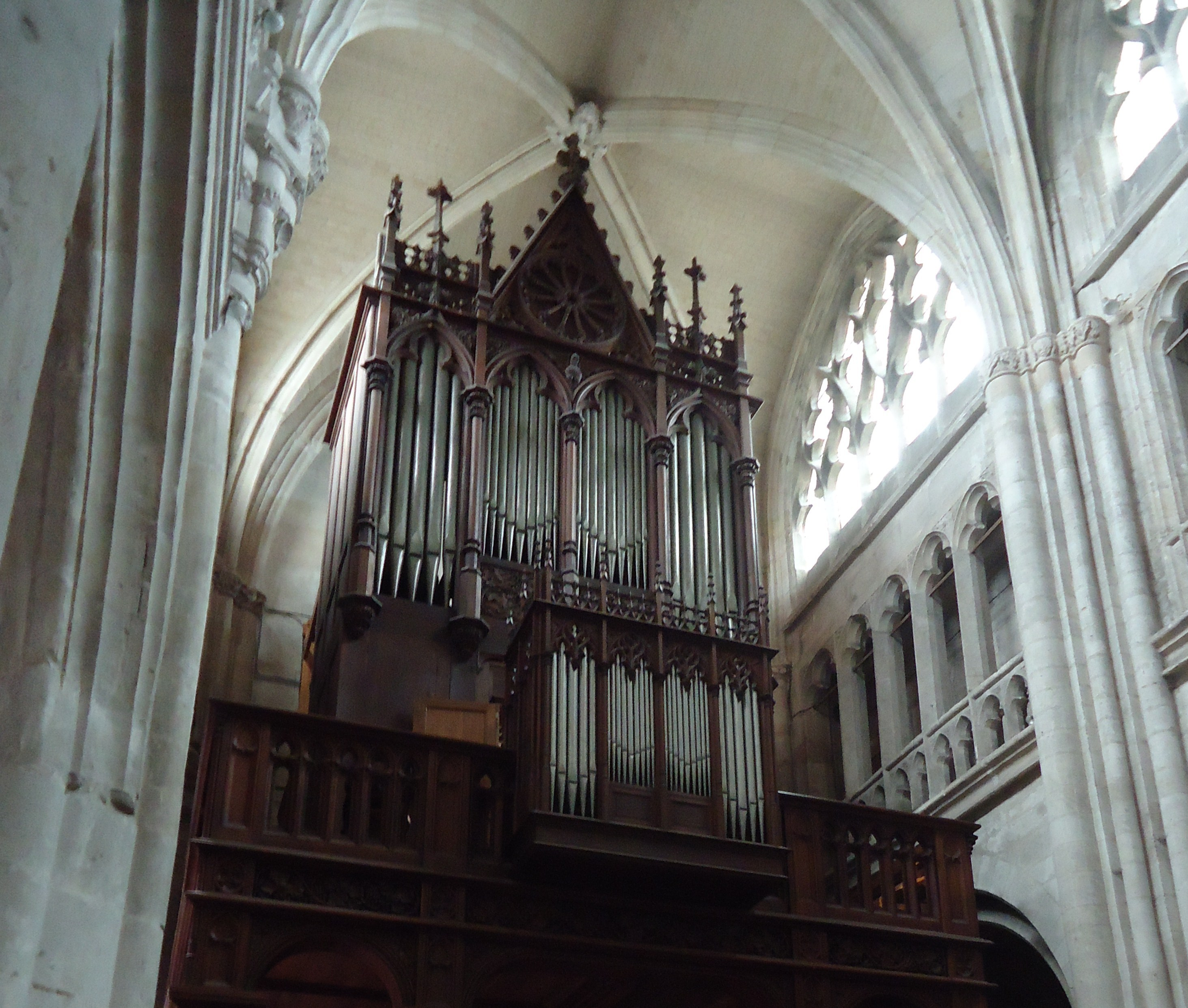 Orgue de l'église Saint-Taurin - Evreux 27 - France